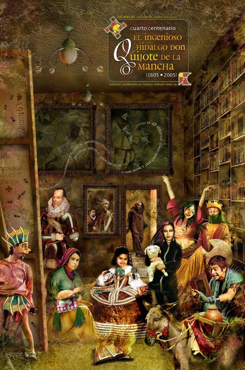 Cartel conmemorativo del cuarto centenario del Quijote de la Mancha.